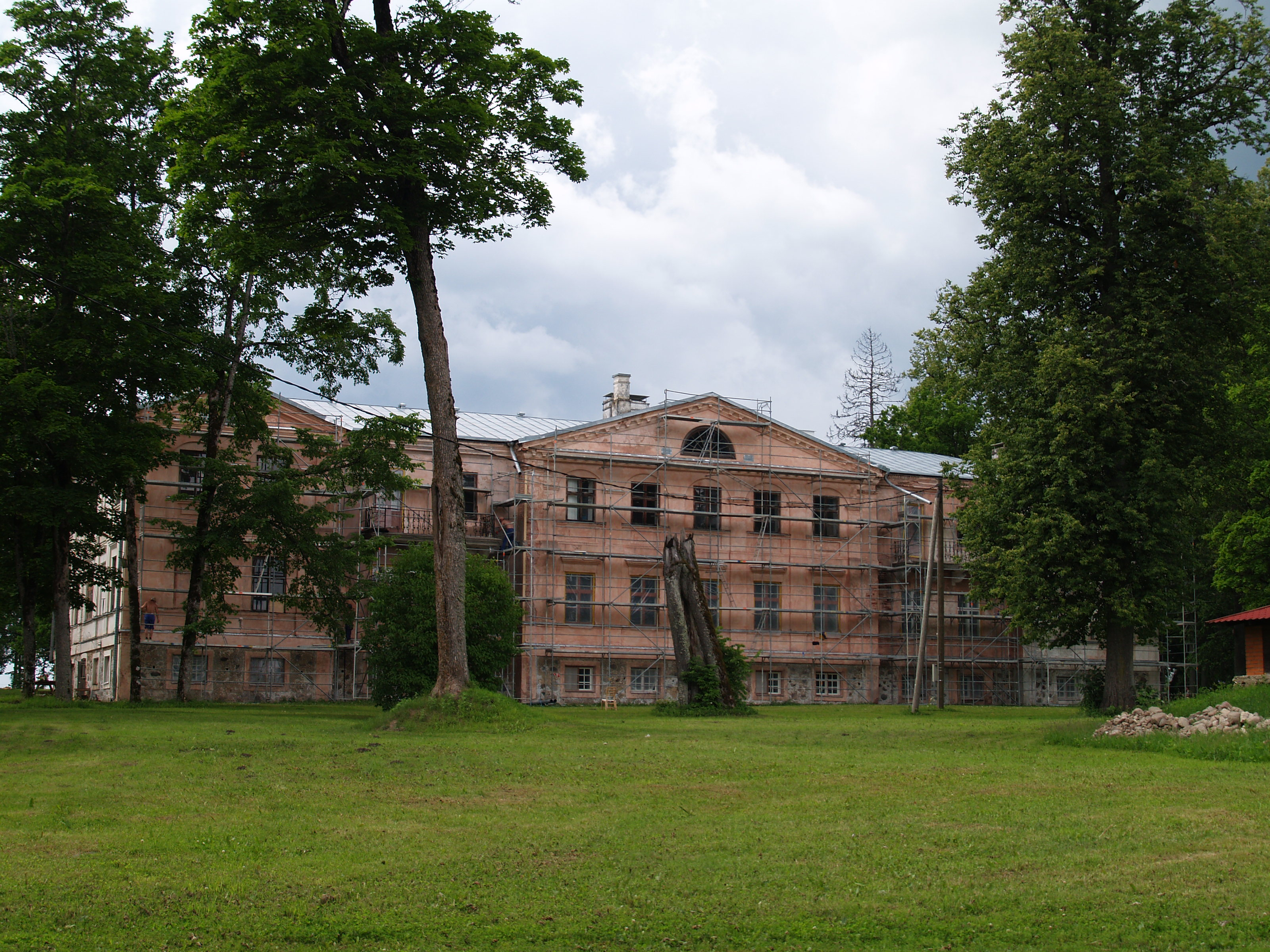 Suure-Kõpu mõisa peahoone.